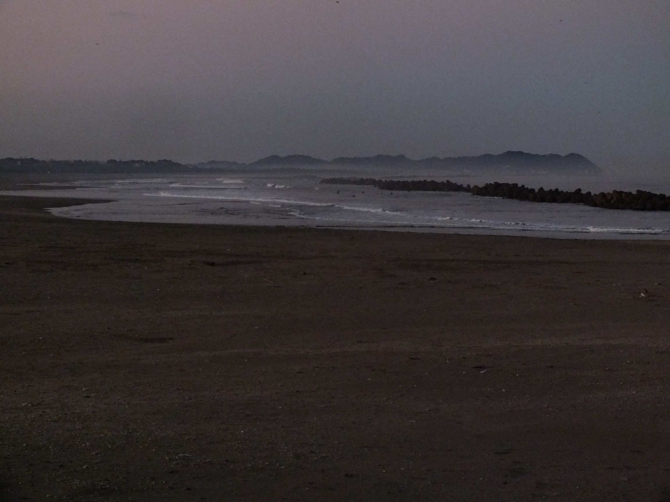 2013-11-30 Hachiman-Misaki Ohhara Isumi いすみ市大原海水浴場